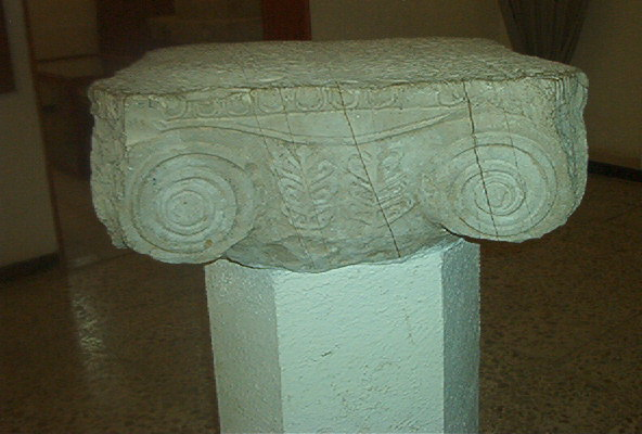 Chapiteau ionique, antiquarium de Bulla Regia (Tunisie)